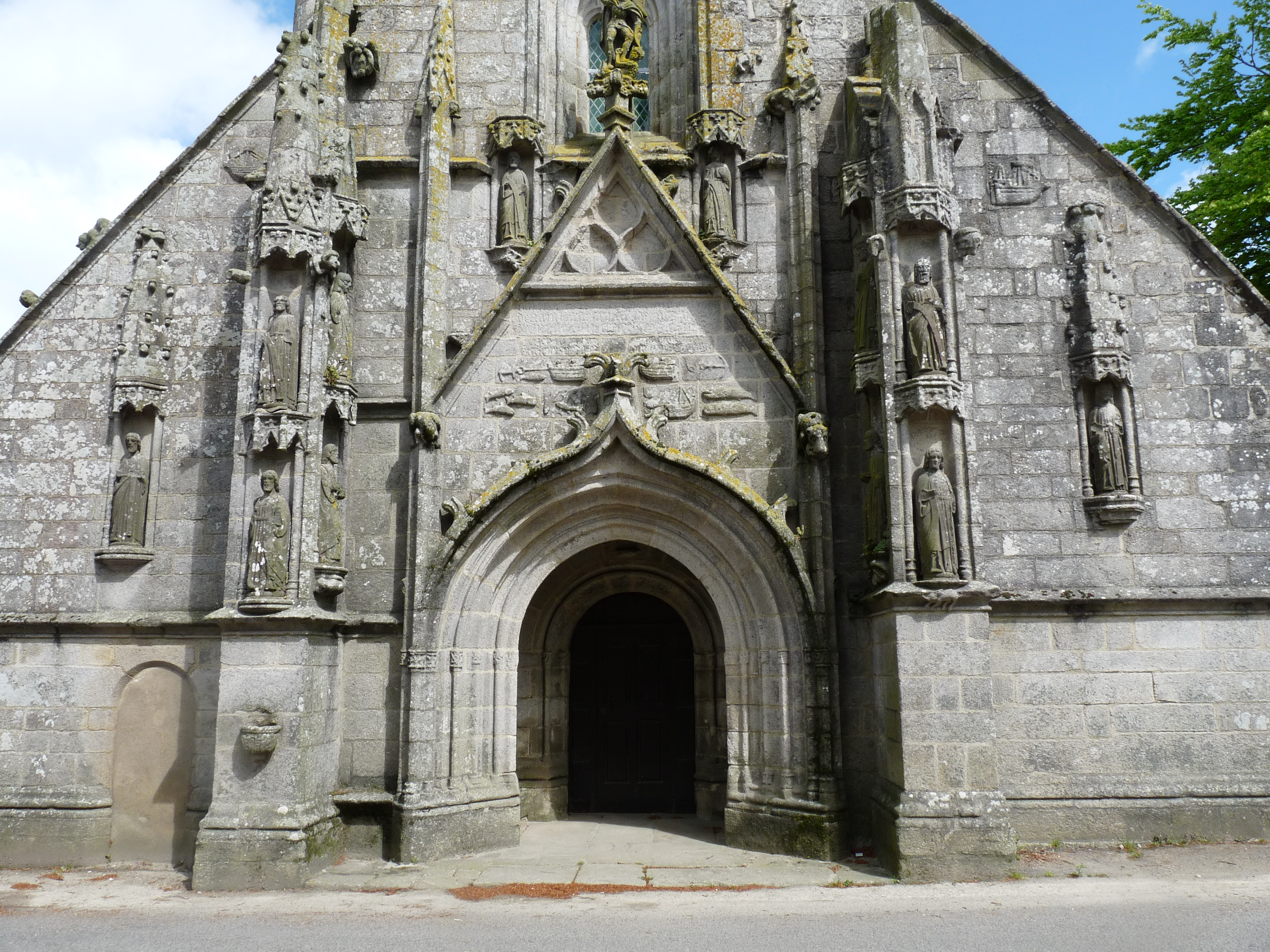 Porche occidental de l'église Notre-Dame de Confort à Confort-Meilars (Finistère, Bretagne)